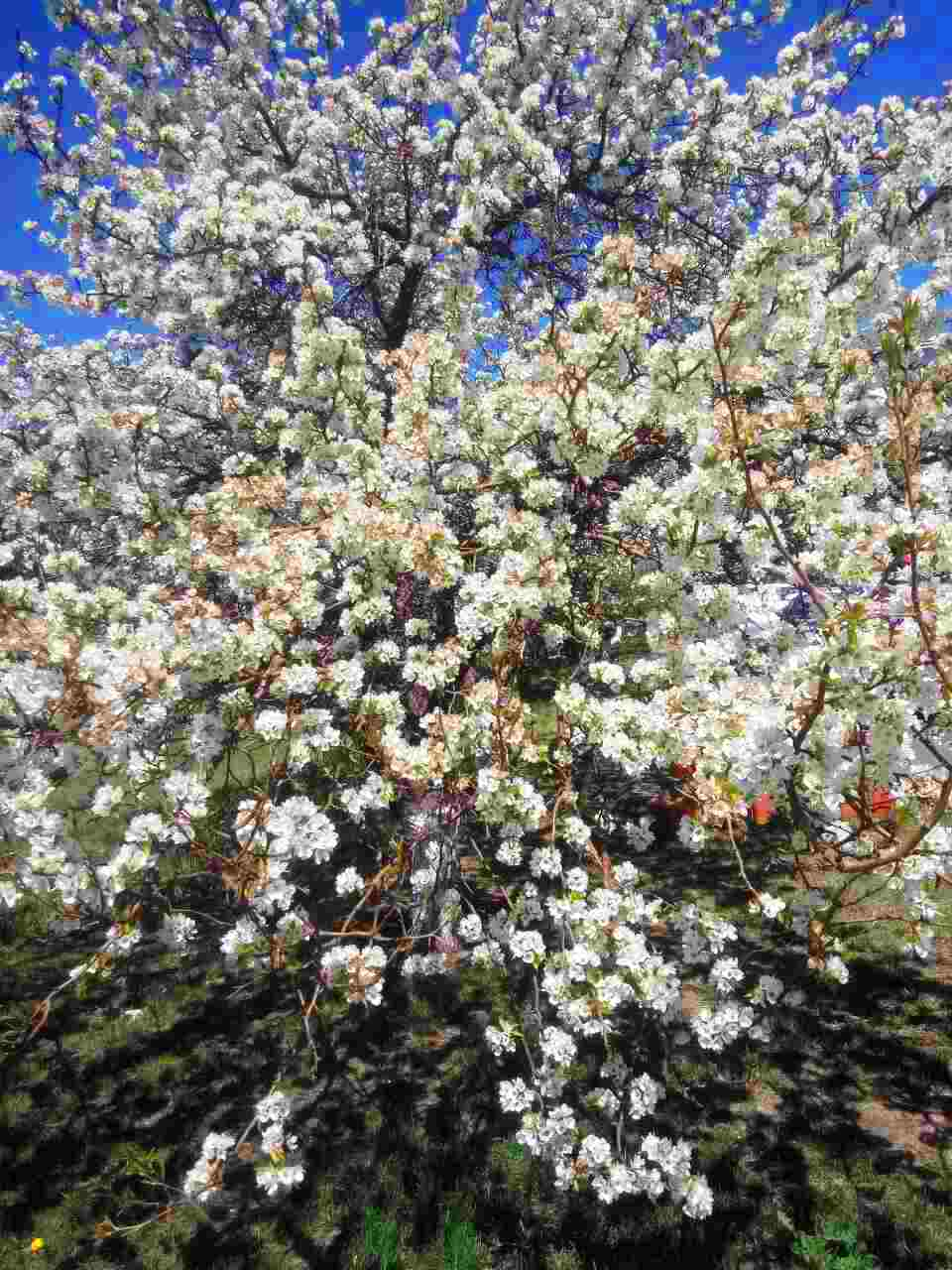 Flowering bird cherry. Buryatia, Russia